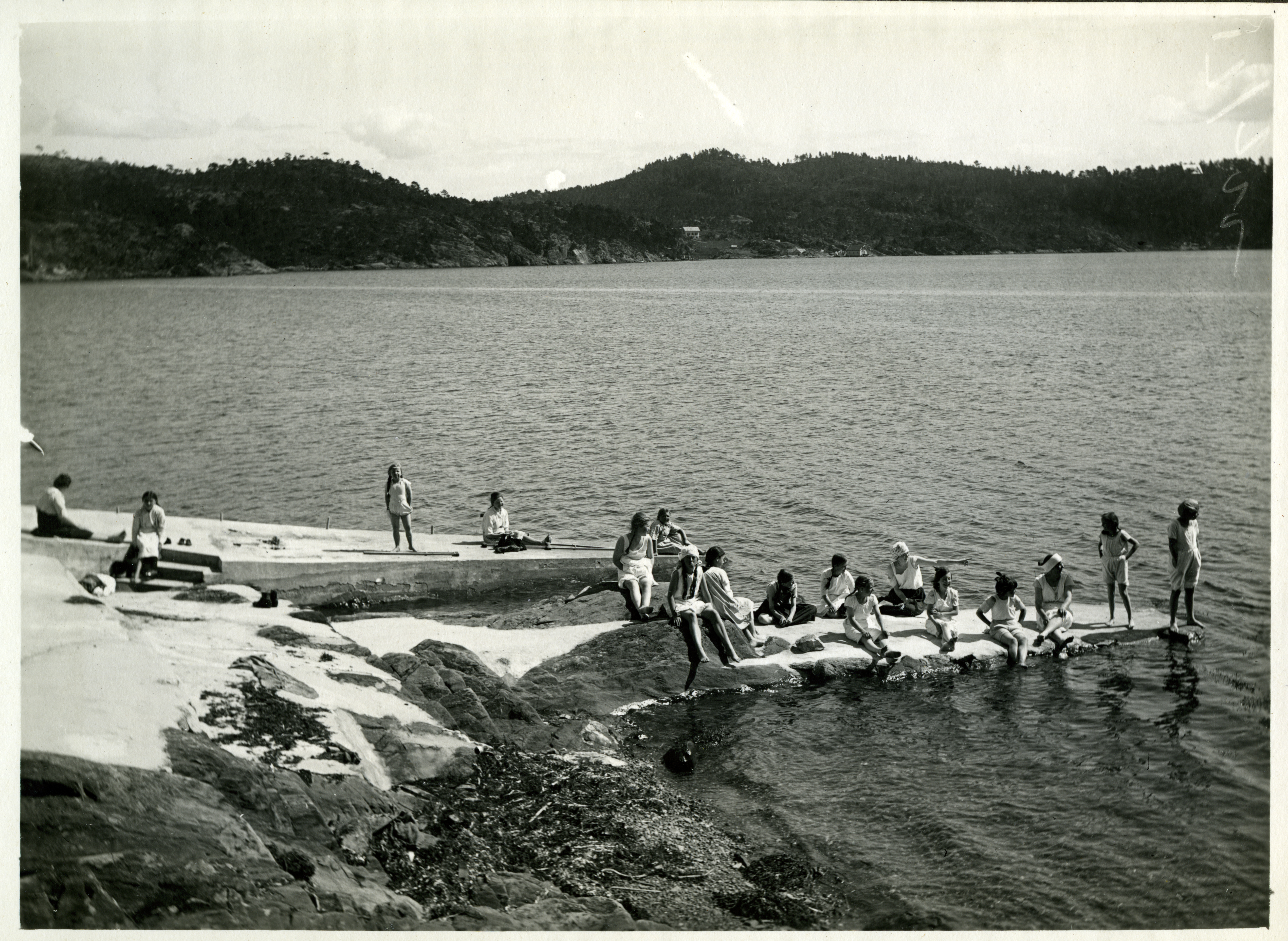 Bildet er hentet fra Arkivverket. Bading ved Hagevik kysthospital. Arkivinstitusjon : Riksarkivet Arkivnavn : Medisinaldirektøren, Overlegen for tuberkulosen/Ktr. for lege- og sunnhetsvesen, tuberkulosesaker Sted : Norge, Hordaland, Os, Hagevik Emneord: Sykehus, Tuberkulose Avbildet